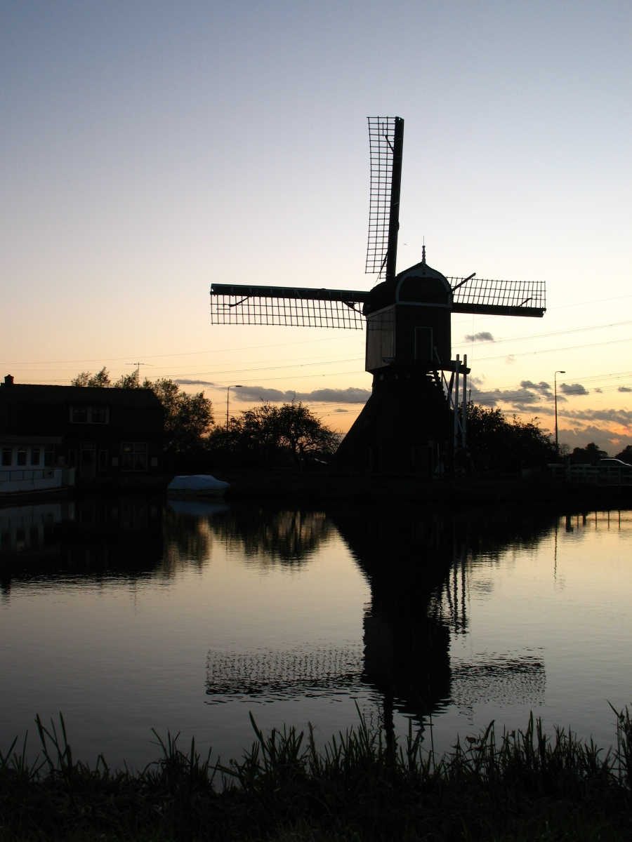 Oukoper Molen, gemeente Stichtse Vecht, Utrecht, wipmolen